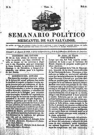 Primera página del "Semanario Político Mercantil de San Salvador", el primer periódico salvadoreño que circuló entre los años 1824 y 1826.